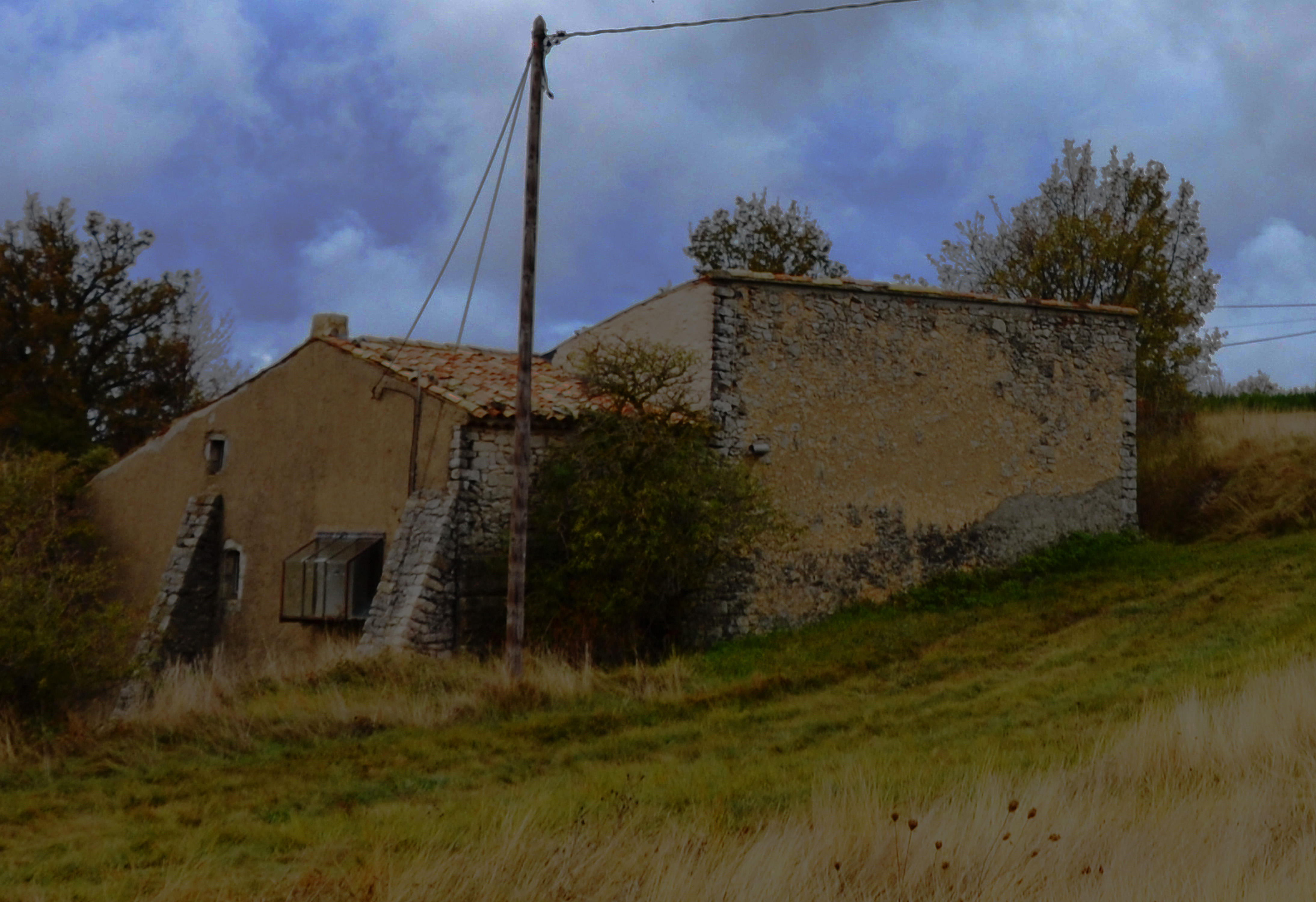 Ferme des graves dite de Jean Giono, à Redortiers (04)